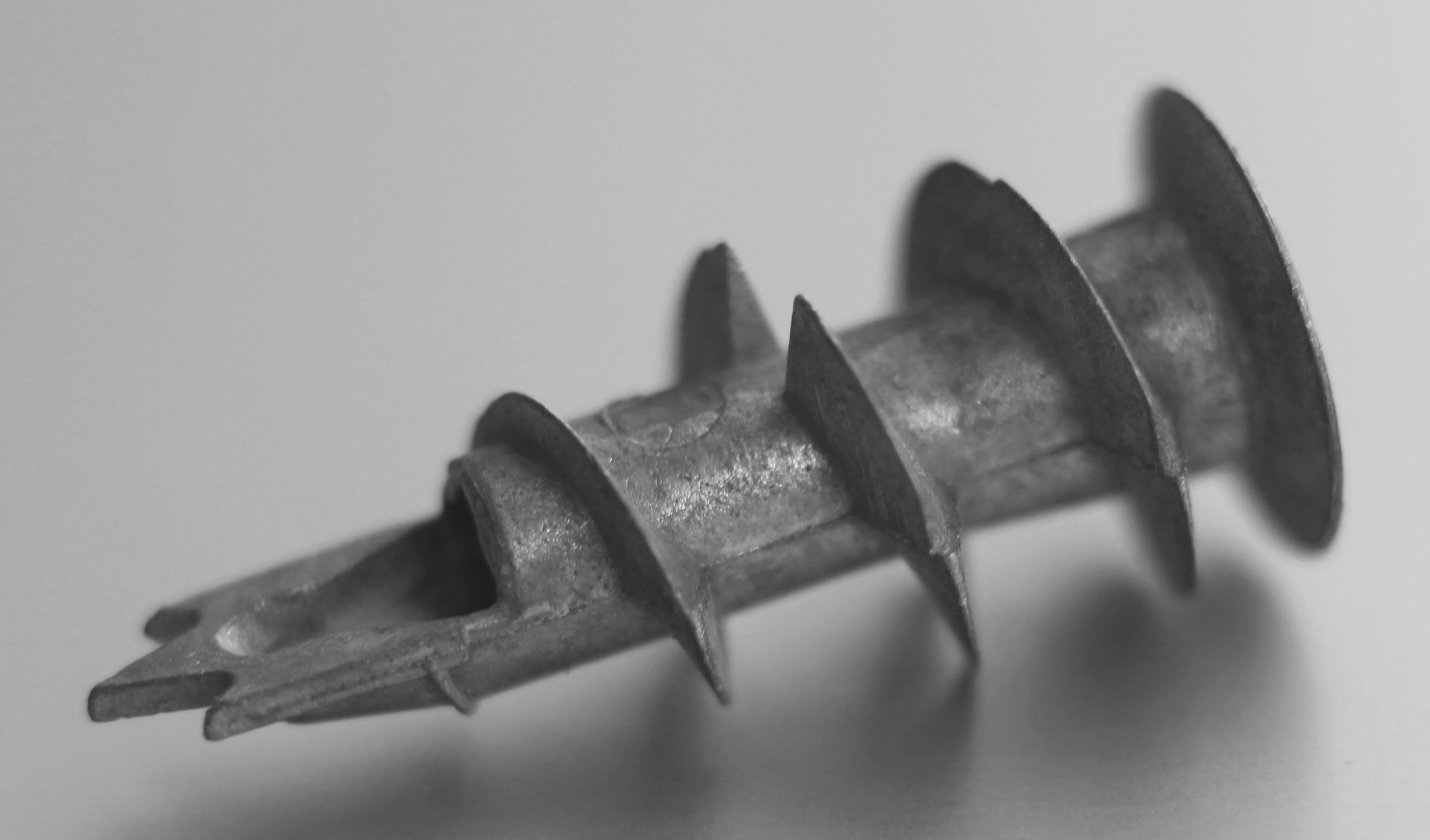 Bildinhalt: Ein Gipskartondübel, auch Rigipsdübel genannt, aus Metall in schwarz-weiß Aufnahmeort: Frankfurt am Main, Deutschland